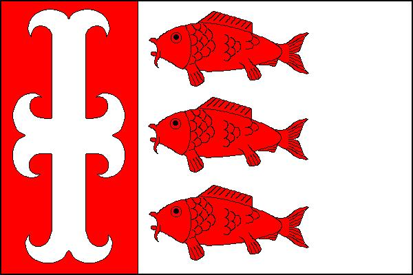 Vlajka obce Olovnice (okres Mělník)